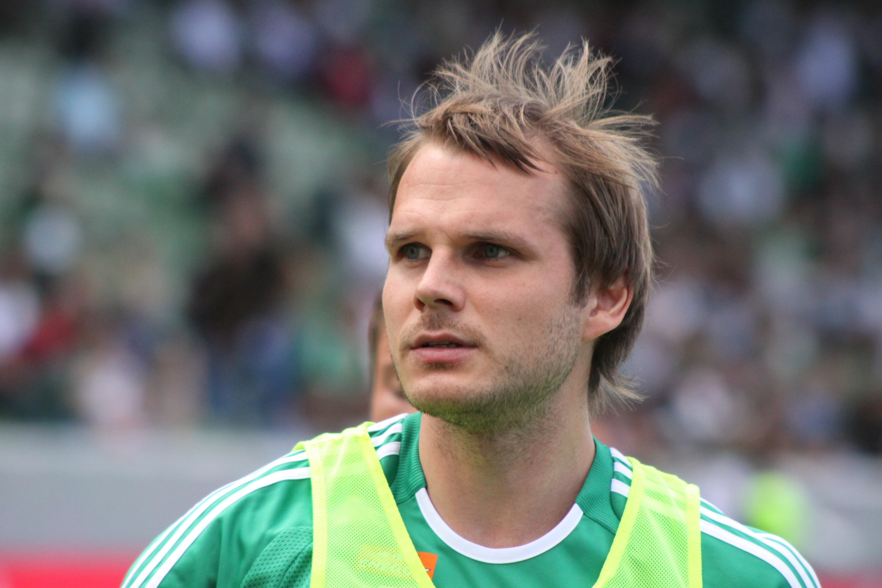 Markus Heikkinen - SK Rapid Wien (2)